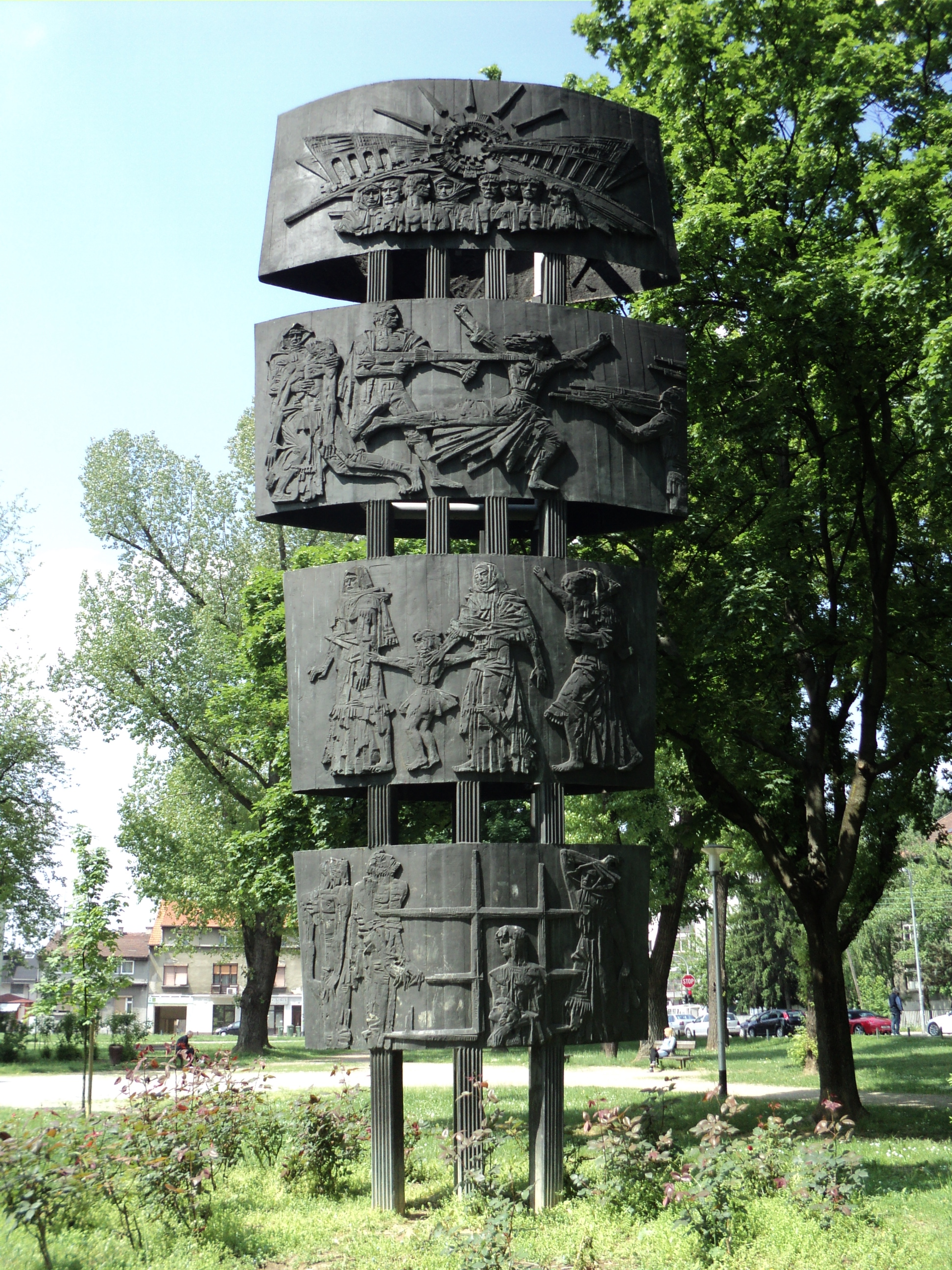 Spomenik palim borcima iz naselja Ciglenica u Zagrebu. Self-made. Jun 2011.